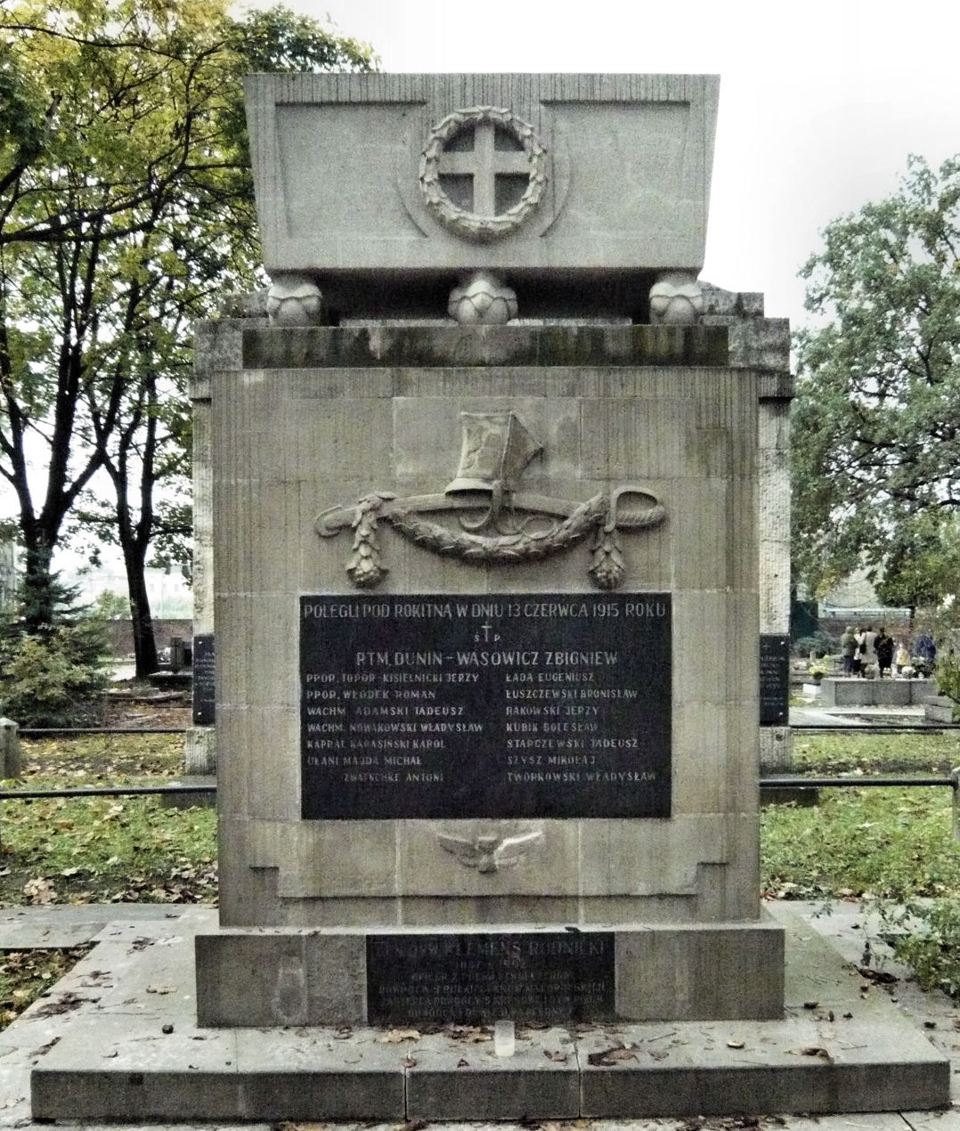 Pomnik bohaterów spod Rokitnej Cmentarz Rakowicki Kraków